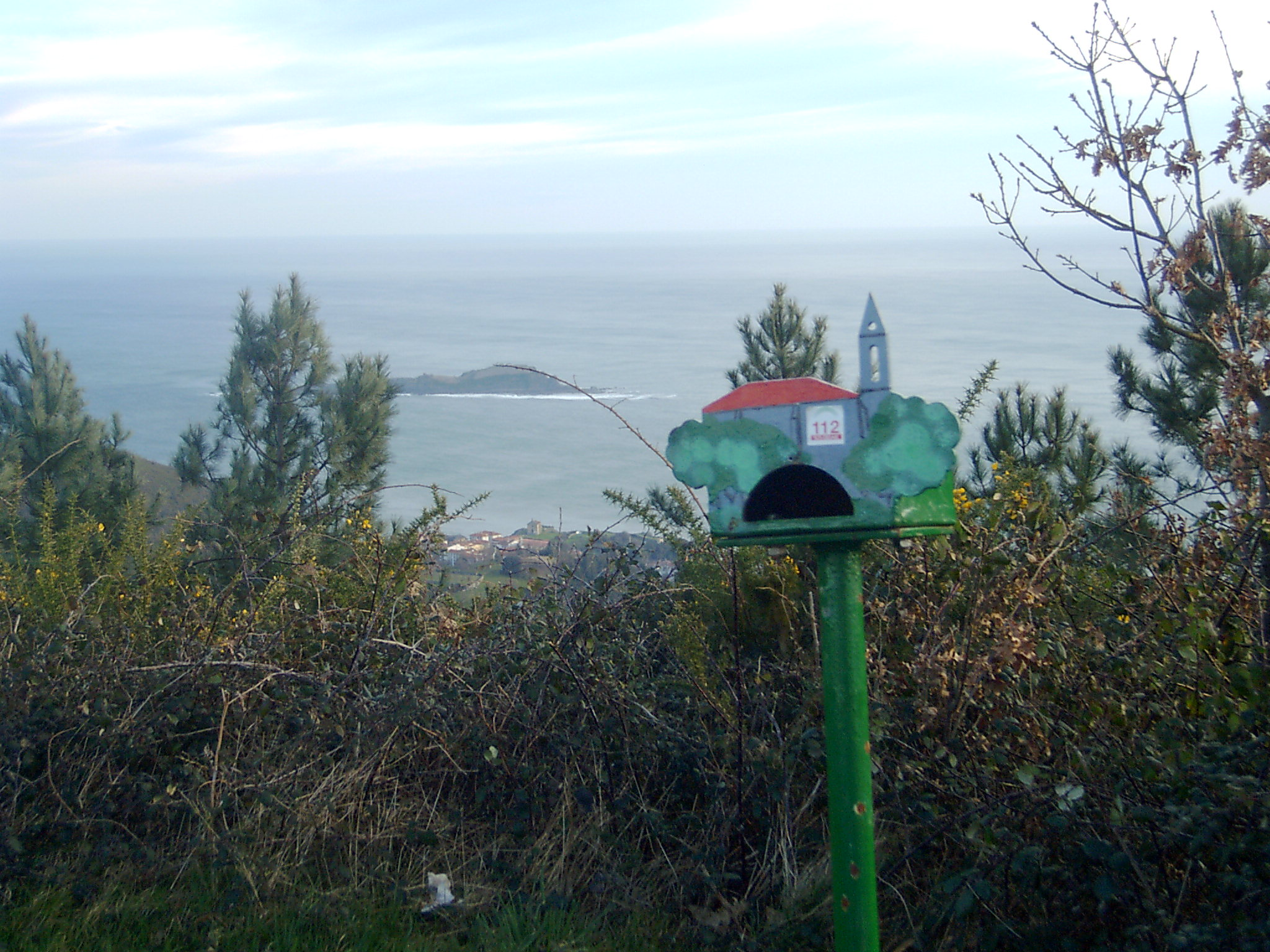 katillotxu mendiaren buzoia